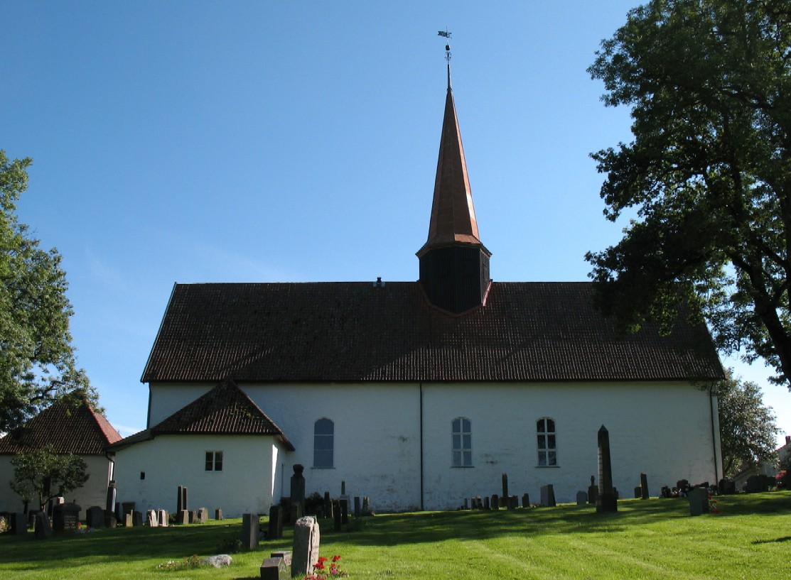 Skjeberg kirke og del av kirkegården sett fra nord